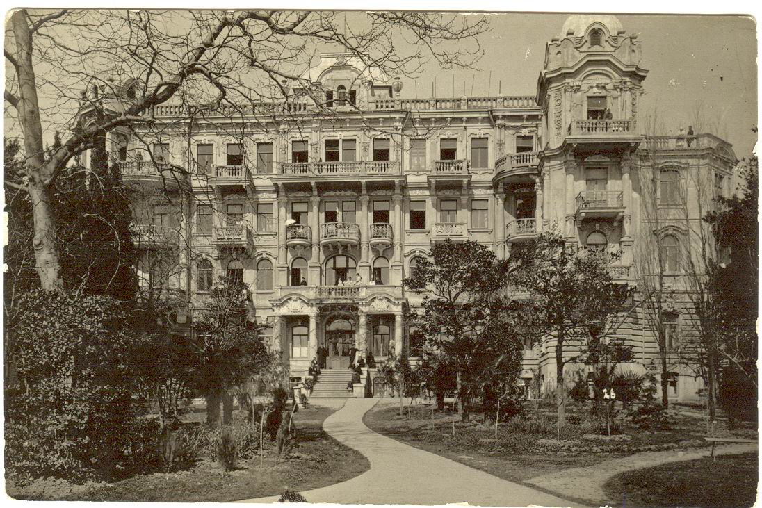 Yelena Villa in Yalta